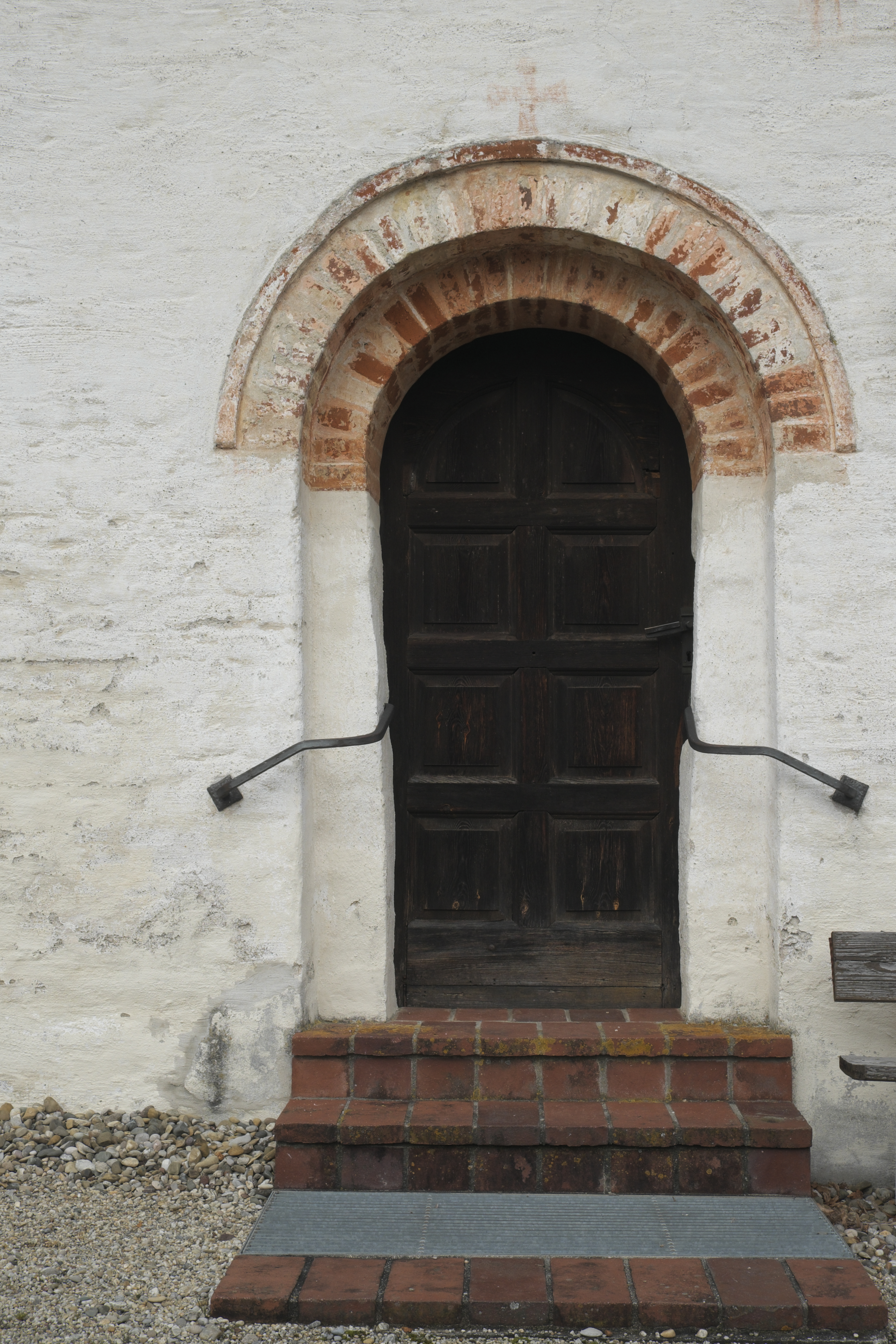 Katholische Filialkirche St. Valentin und St. Martin in Gundelshausen (Schweitenkirchen) im Landkreis Pfaffenhofen an der Ilm (Bayern/Deutschland), romanische Saalkirche, Stufenportal an der südlichen Langhauswand